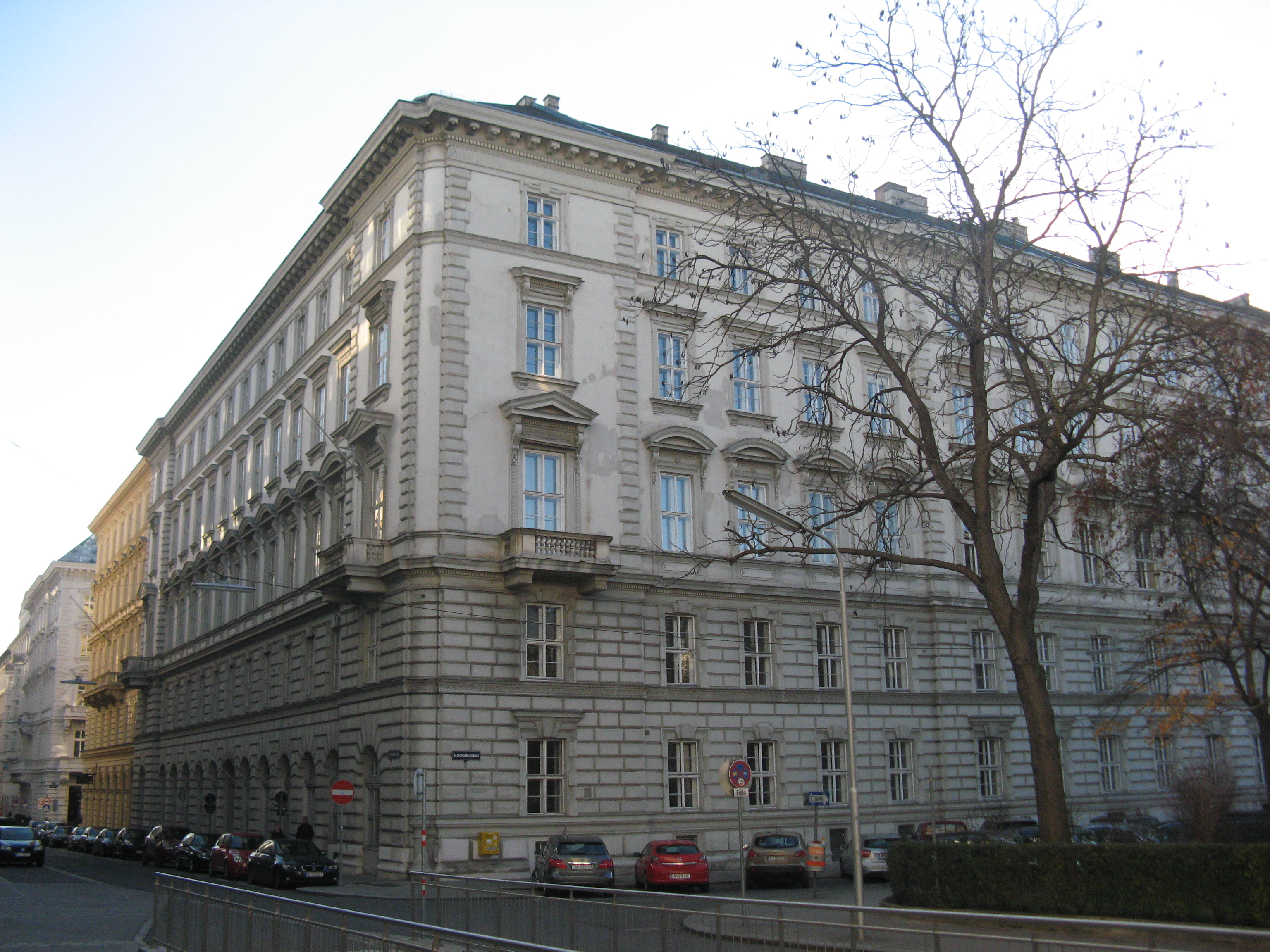 Schillerhof (1870-71) von Johann Romano und August Schwendenwein, Elisabethstraße 9, Wien-Innere Stadt